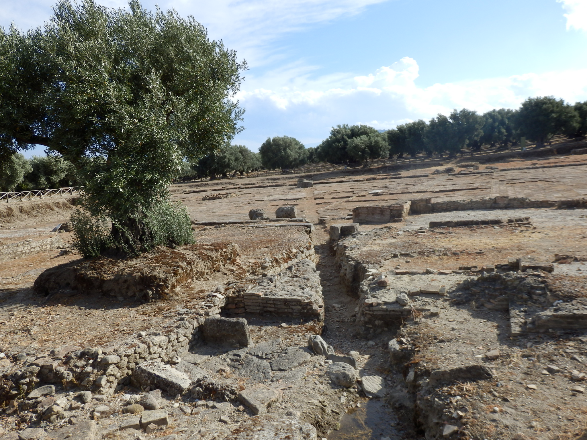 Vestiges de l'habitation et du forum de Scolacium.